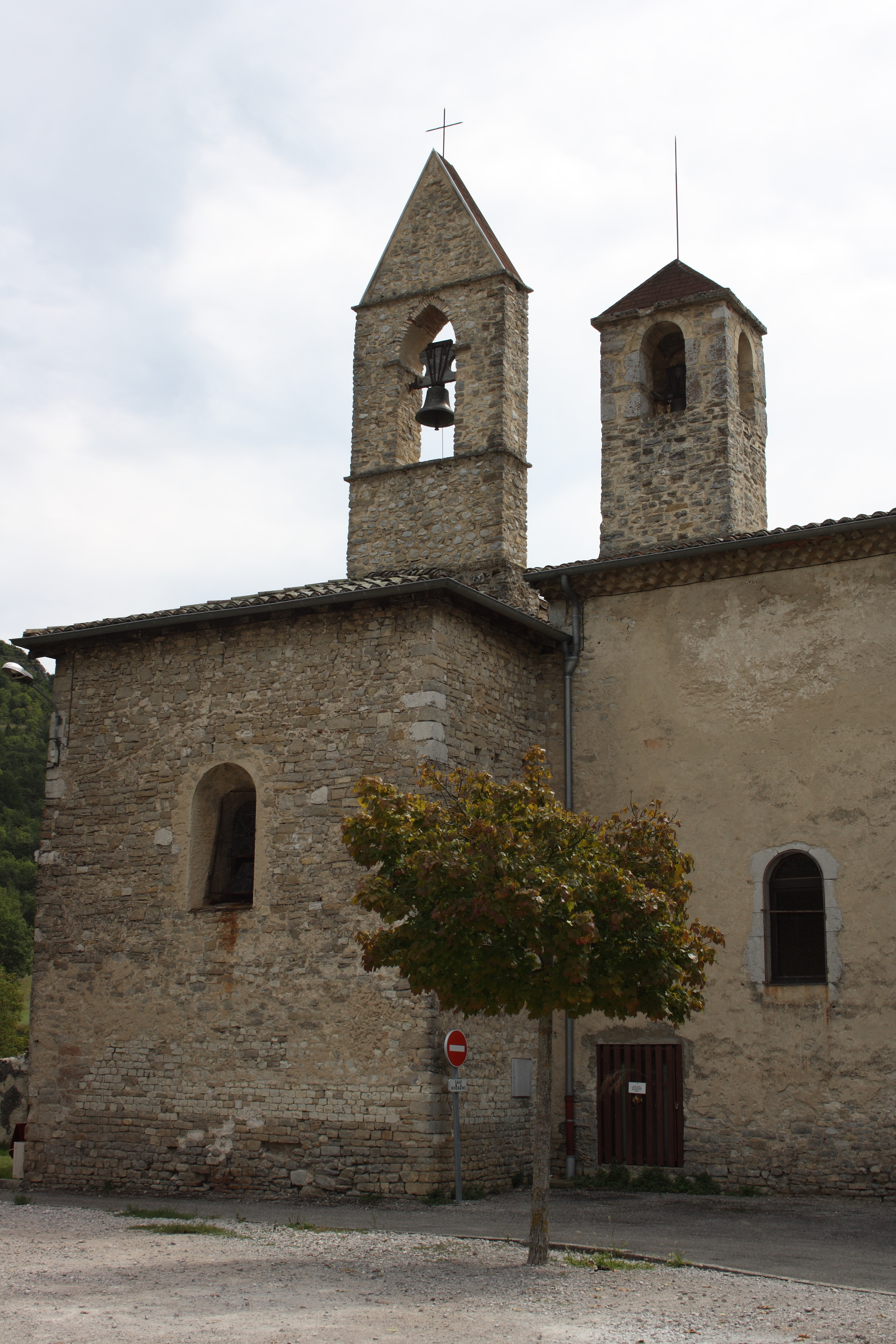 ehemalige Abtei- und heutige Evangelische Kirche (Temple) in Sainte-Croix (Drôme)